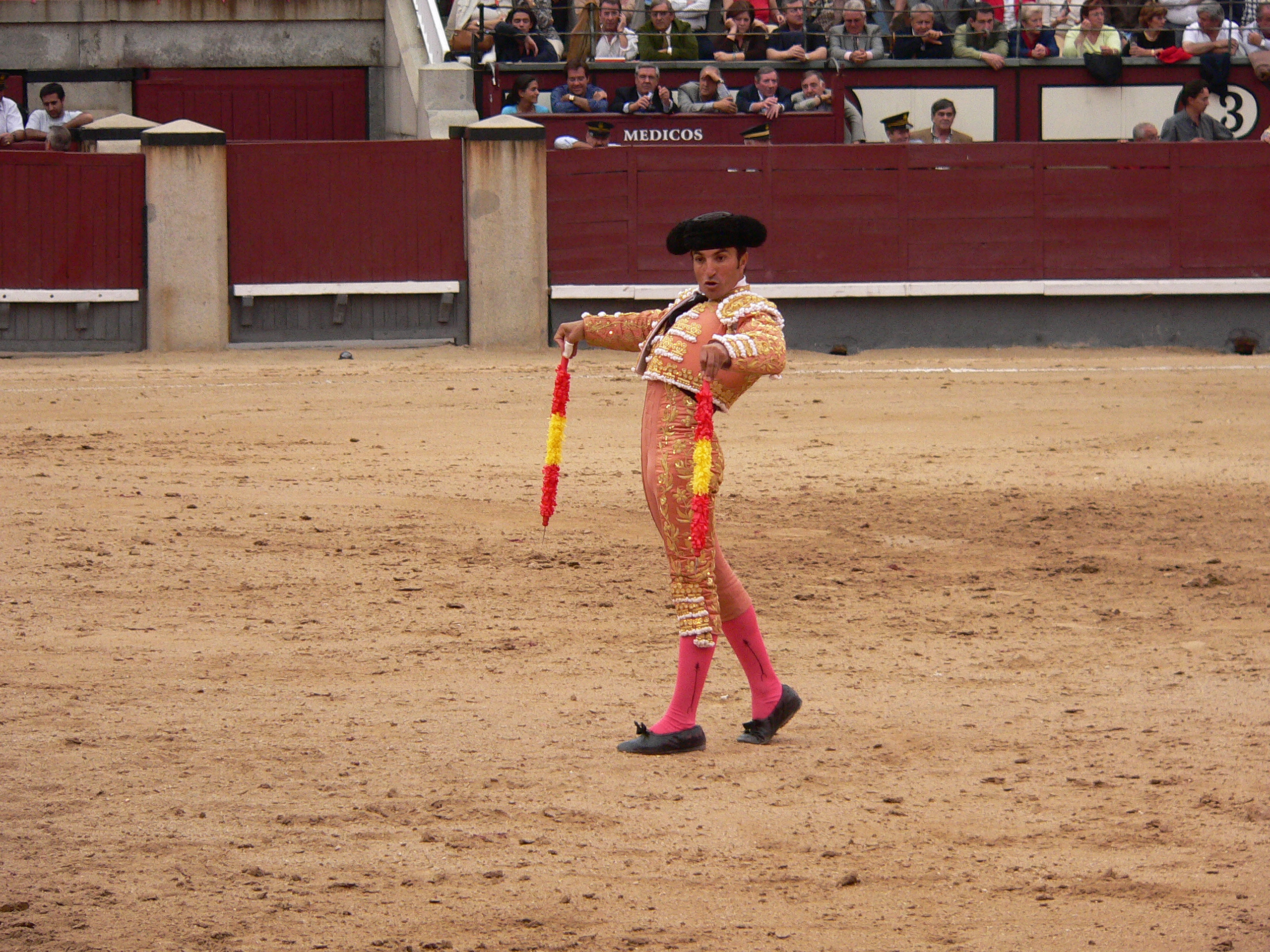 Description: Banderillero (Jose Pedro Prados El Fundi) Place : Plaza de Toros Las Ventas City : Madrid Country : Spain Photographer: © Manuel González Olaechea y Franco Shot date : October, 9th , 2005